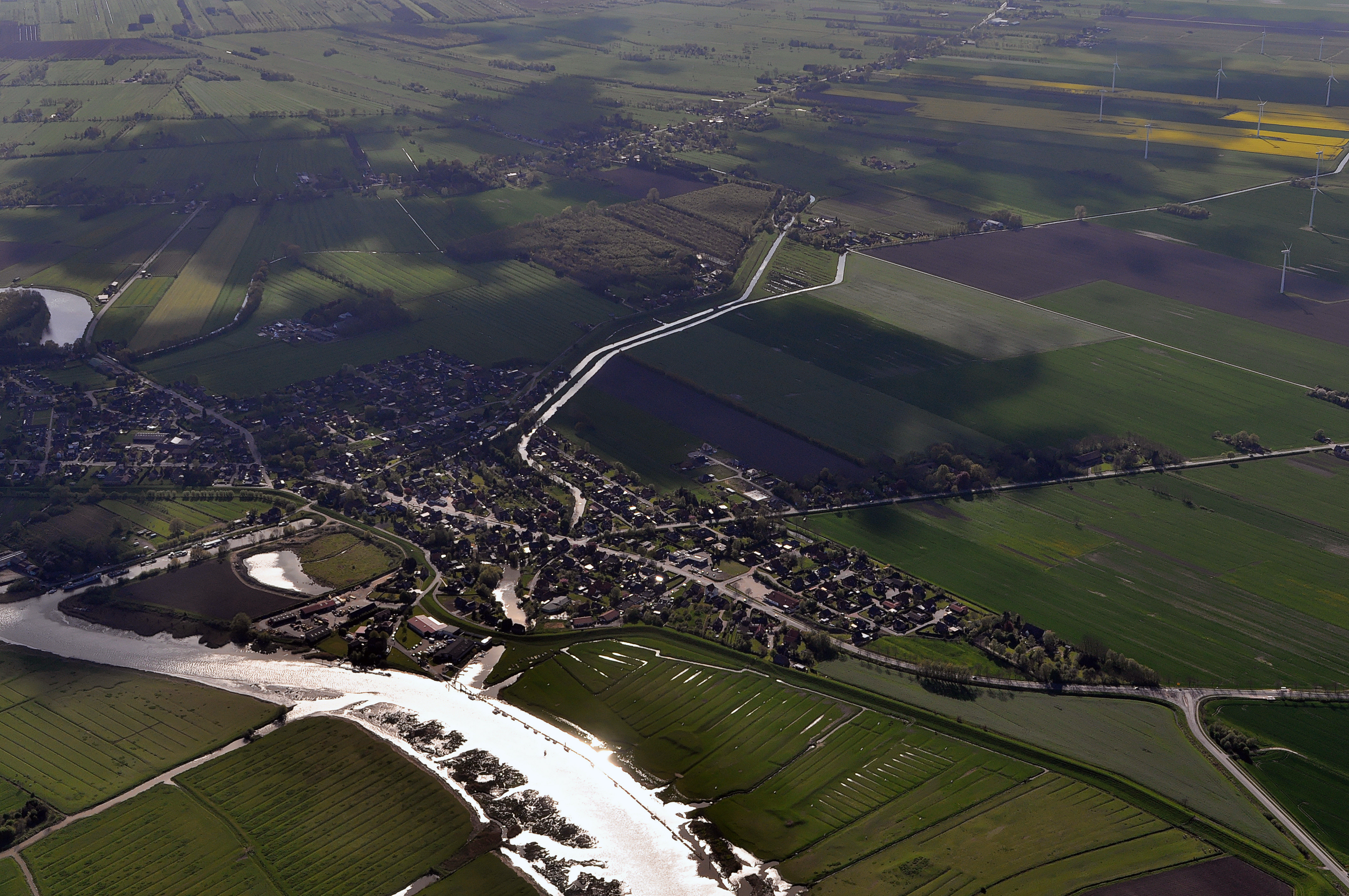 Luftbilder von der Nordseeküste 2012-05